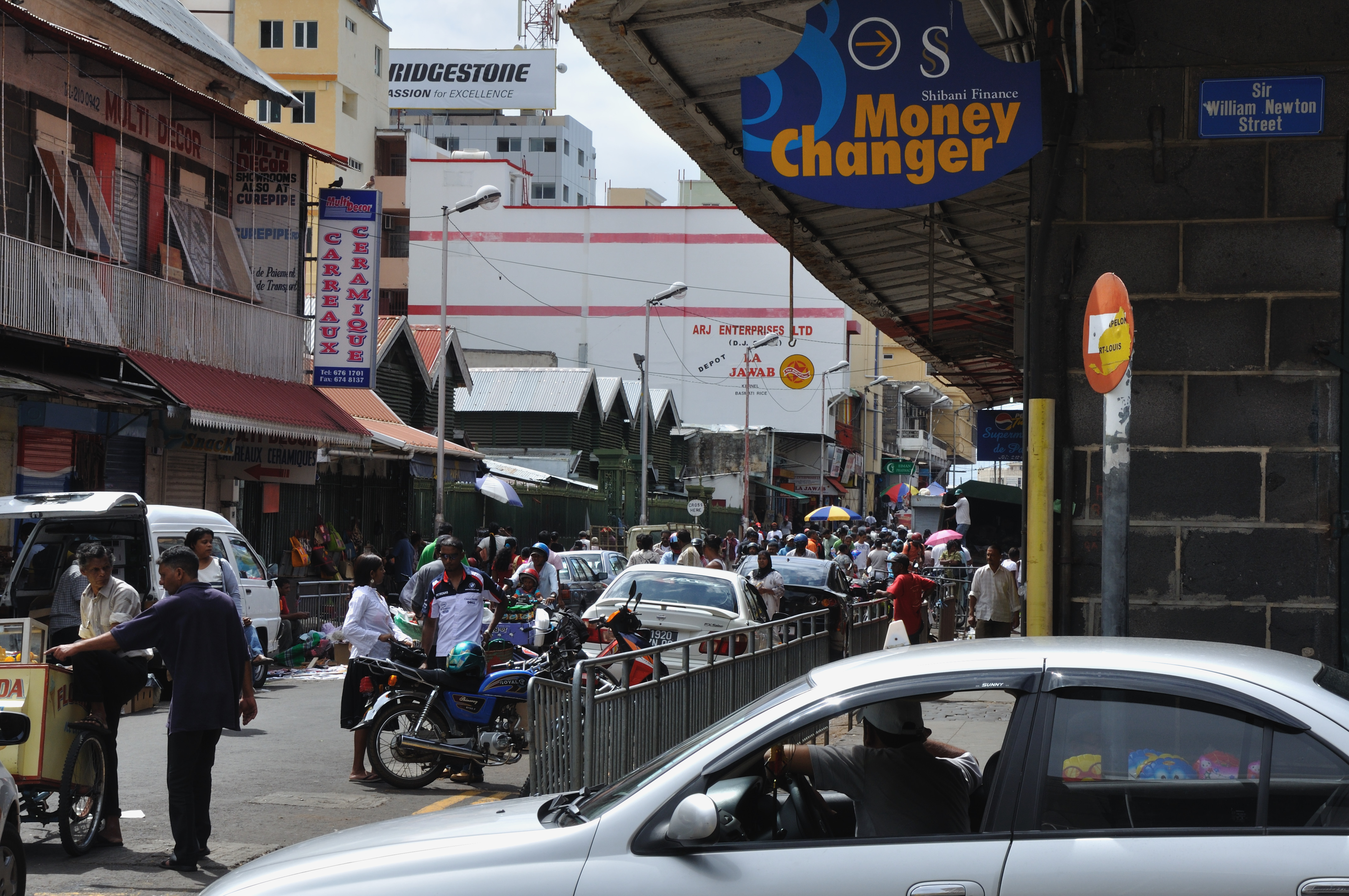 Mauritius, Port Louis